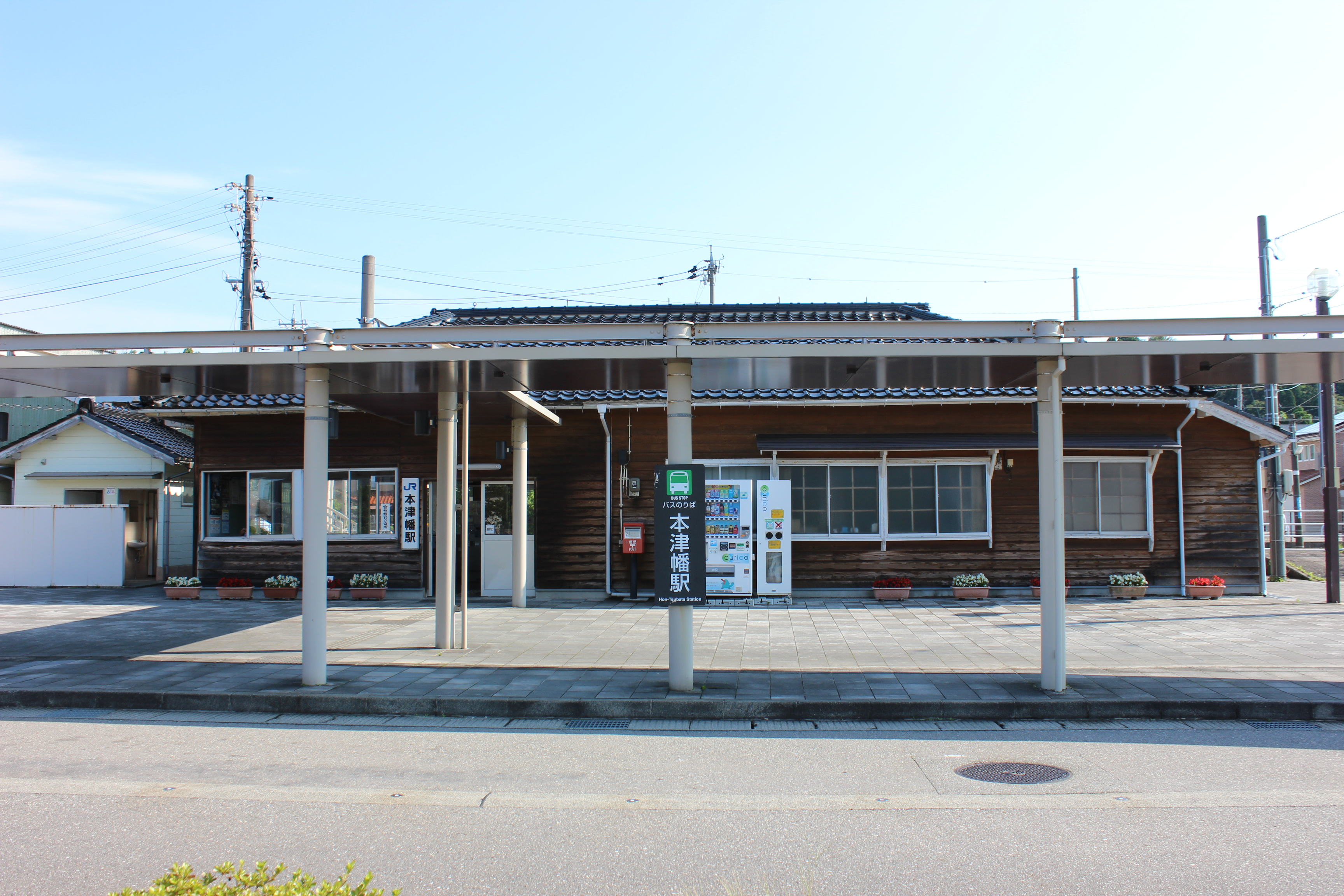 本津幡駅（石川県河北郡津幡町） Canon EOS Kiss X5